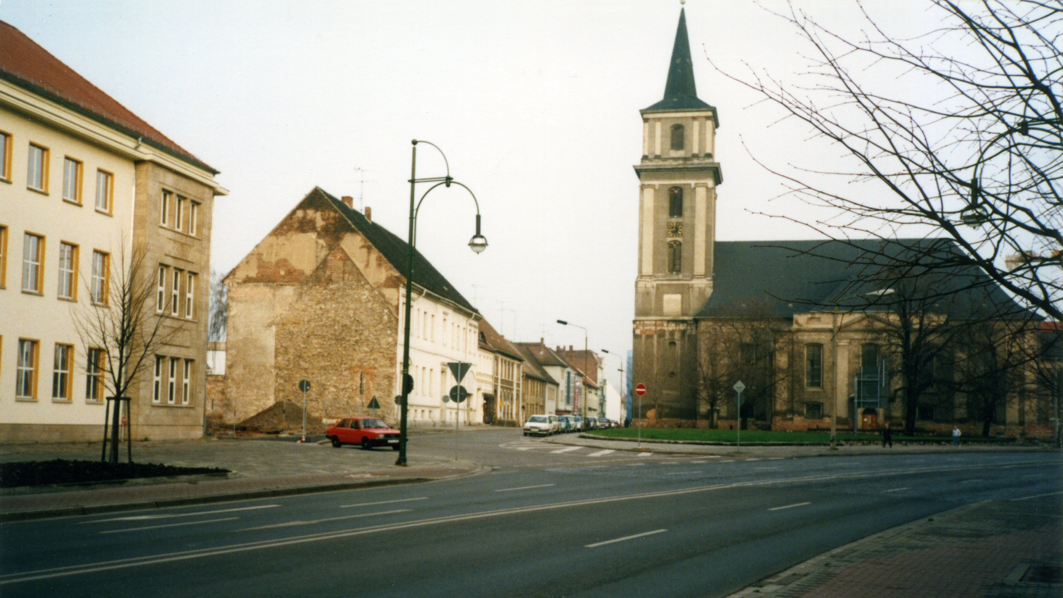 Die Johannisstraße in Dessau-Roßlau, ohne Fürst-Franz-Denkmal und der St. Johanniskirche im Zustand vor der Sanierung.